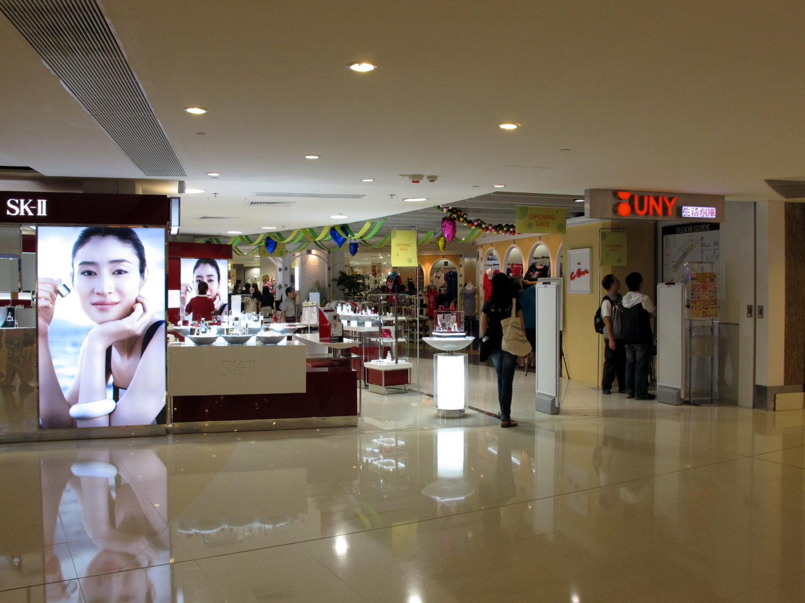 UNY Lok Fu Plaza Store Level 3 Enterance